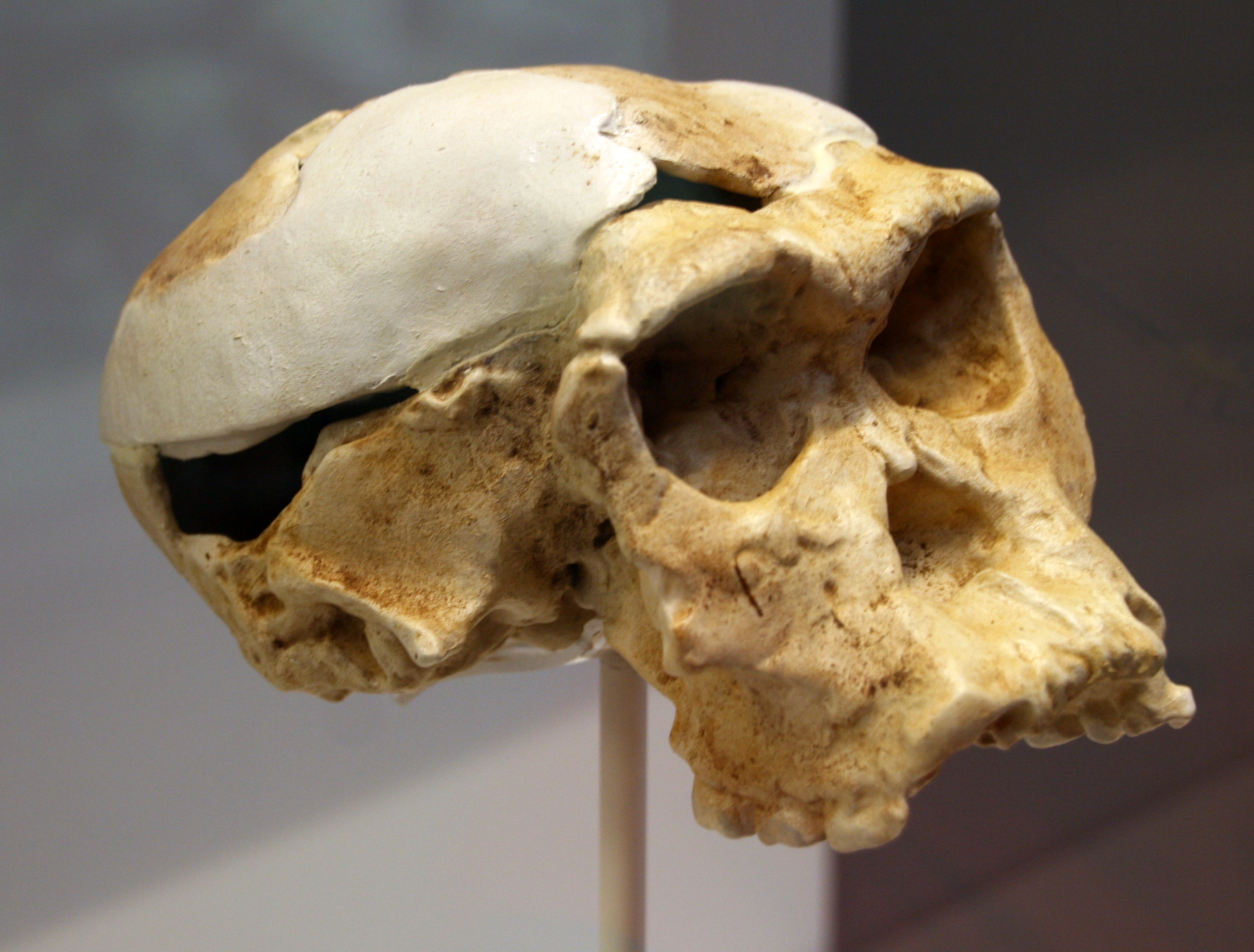 Cráneo y calota de Homo habilis, OH 24 o "Twiggy". Réplica Original: inmediaciones de DK, Garganta de Olduvai (Tanzania). 1,8 millones de años Museo Nacional de Dar Es Salaam (Tanzania) Réplica: Instituto de Evolución en África Exhibido en exposición temporal, "La cuna de la humanidad", en el Museo Arqueológico de Regional de Madrid